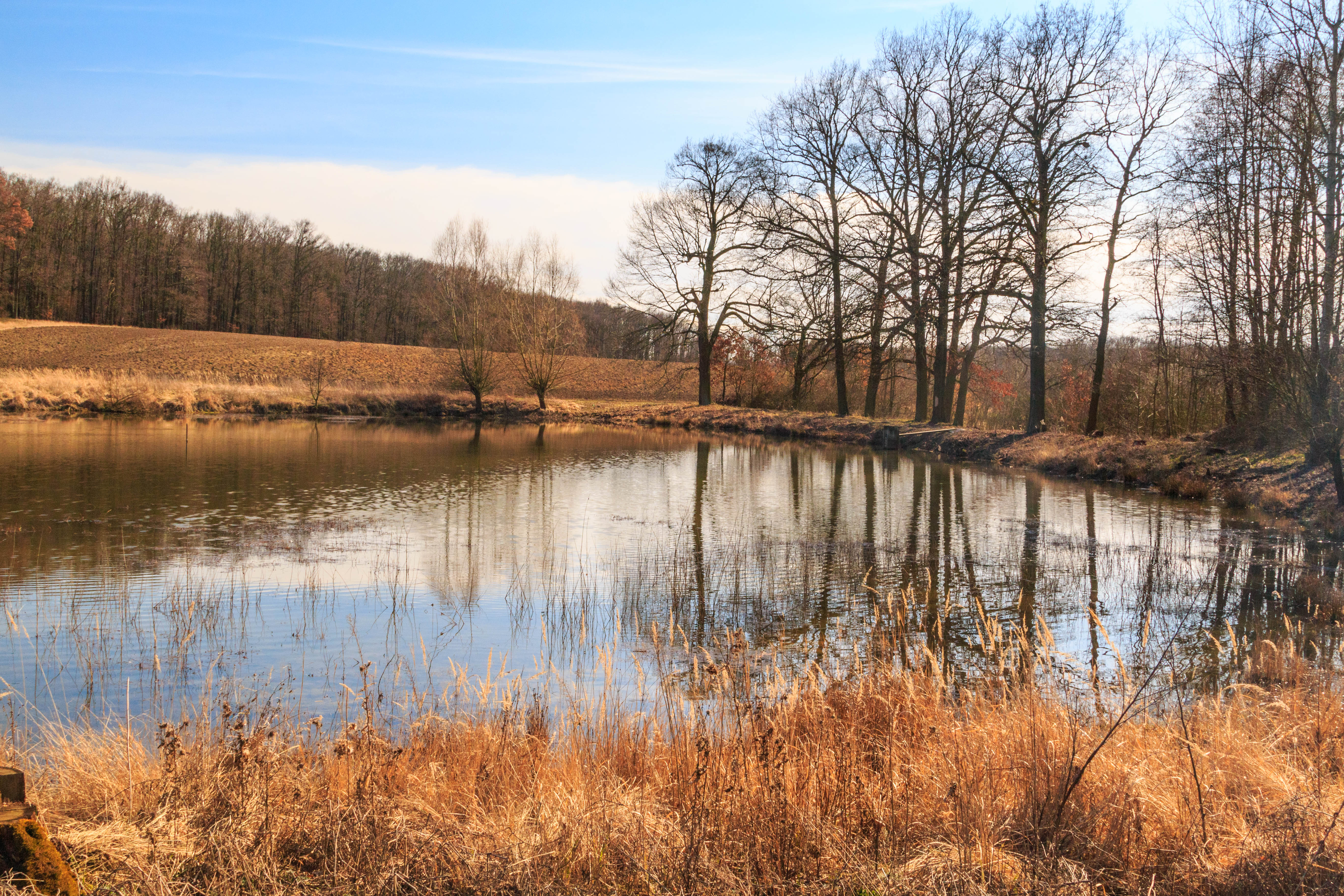 Běloveské rybníčky - Dolní rybník Project: Vodstvo